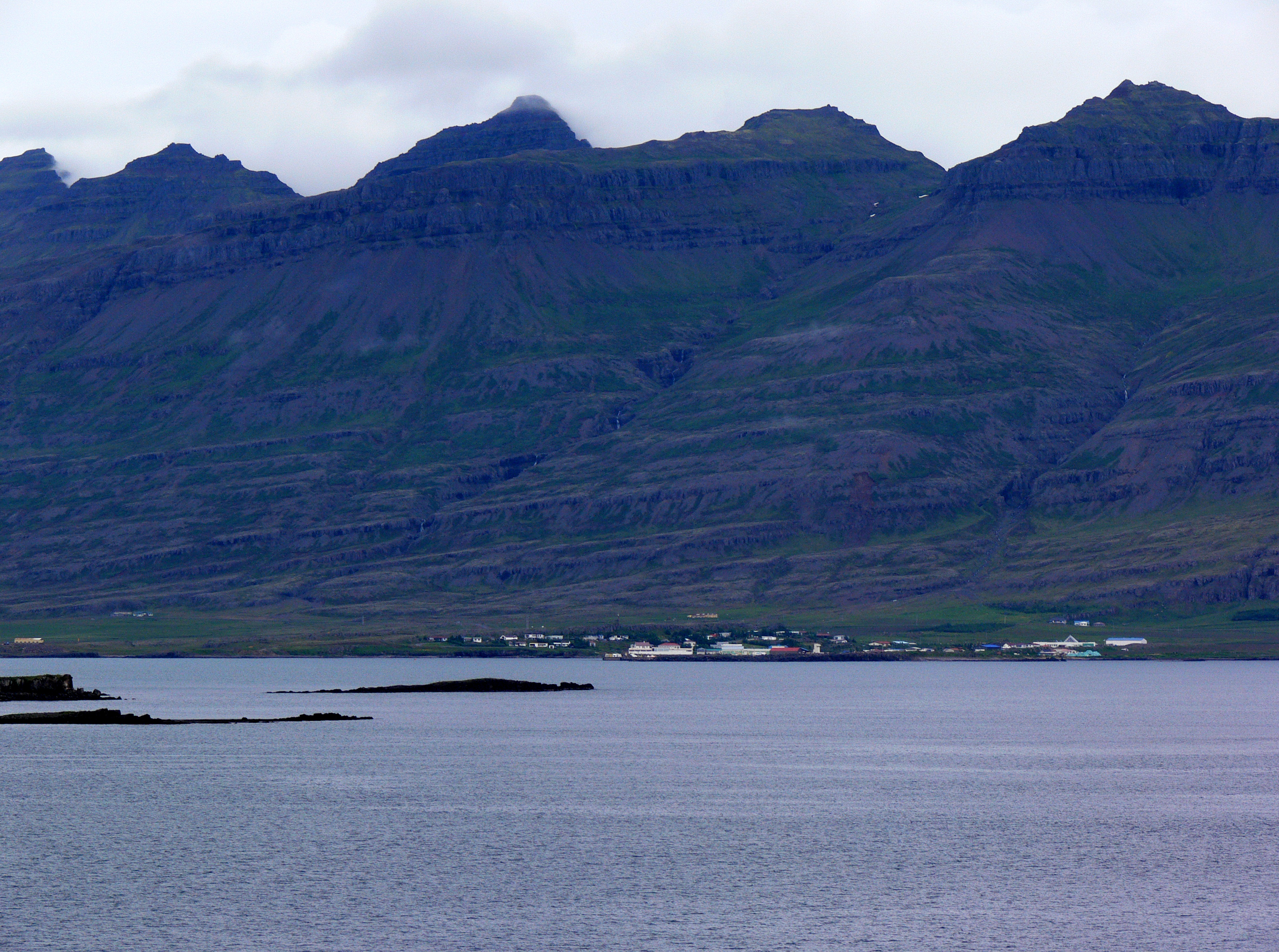 Breiðdalsvík